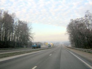 Dálnice z Kyjeva do Žitomiru na Ukrajině